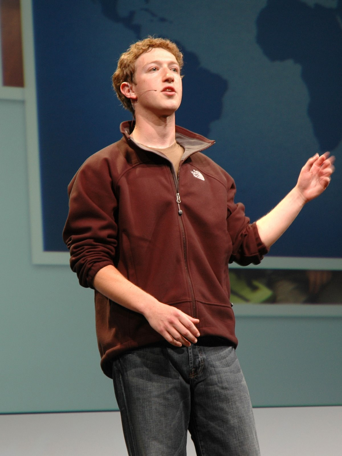 Mark Zuckerberg at Facebook's first F8 event, held May 24, at the San Francisco Design Center in San Francisco